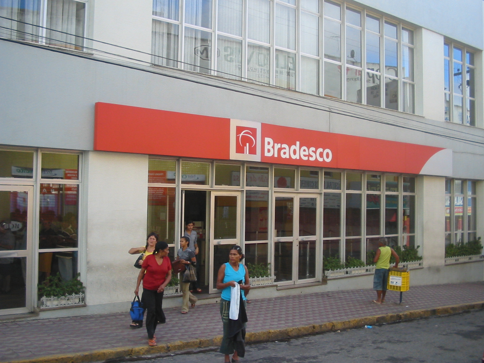 Caruaru (Pernambuco), Brasil. Agência do Banco Bradesco. Caruaru (Pernambuco), Brazil. Bradesco Bank.